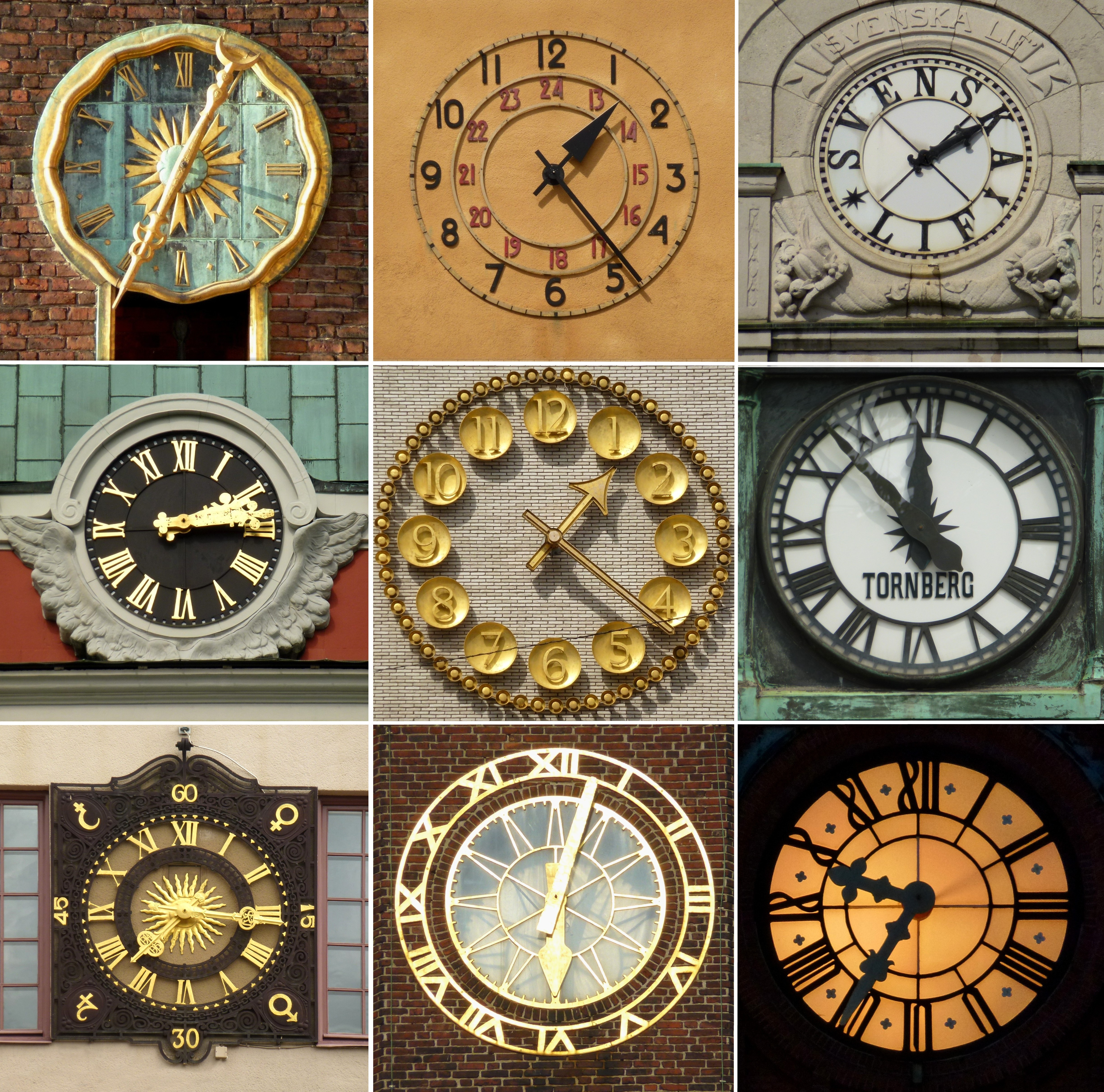 Upptill: Stockholms stadshus, Klara Norra kyrkogata, Norrmalmstorg Mitten: Sankt Jacobs kyrka, Åhléns City, Tornbergs ur Nertill: Engelbrektsplan 2, Högalidskyrkan, Klara kyrka